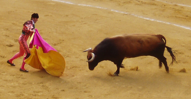 El diestro jerezano Juan José Padilla torea a un miura en la plaza de toros de Estepona, España.